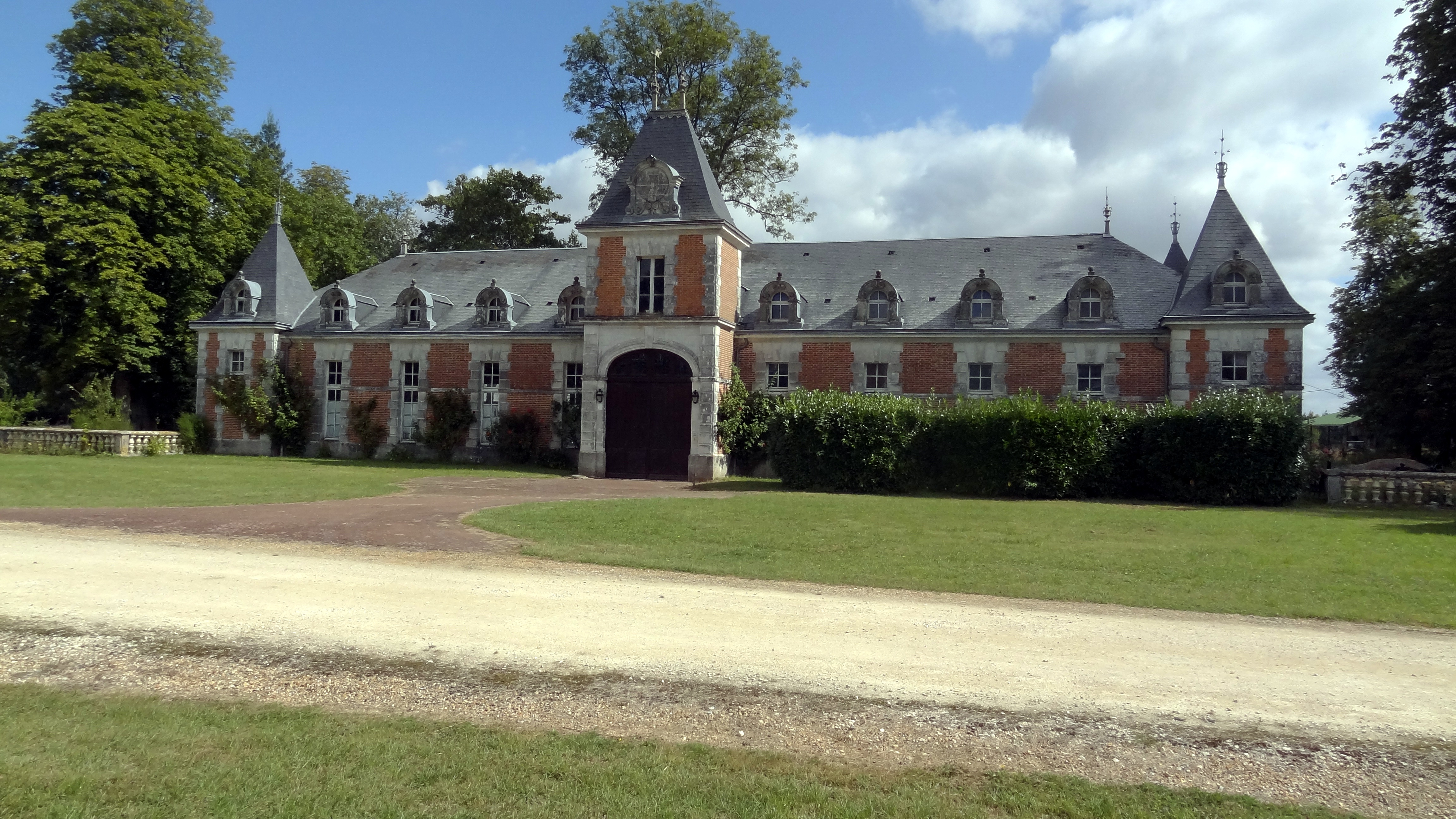 Château de Rocheux, Lignières, Loir-et-Cher, France